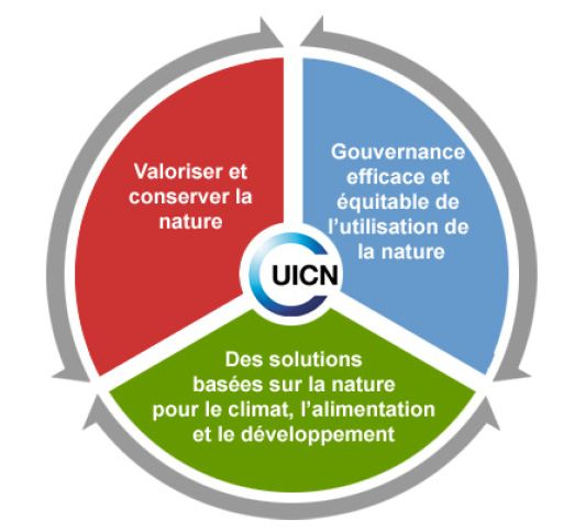 Cadre du Programme de l'UICN 2013-2016